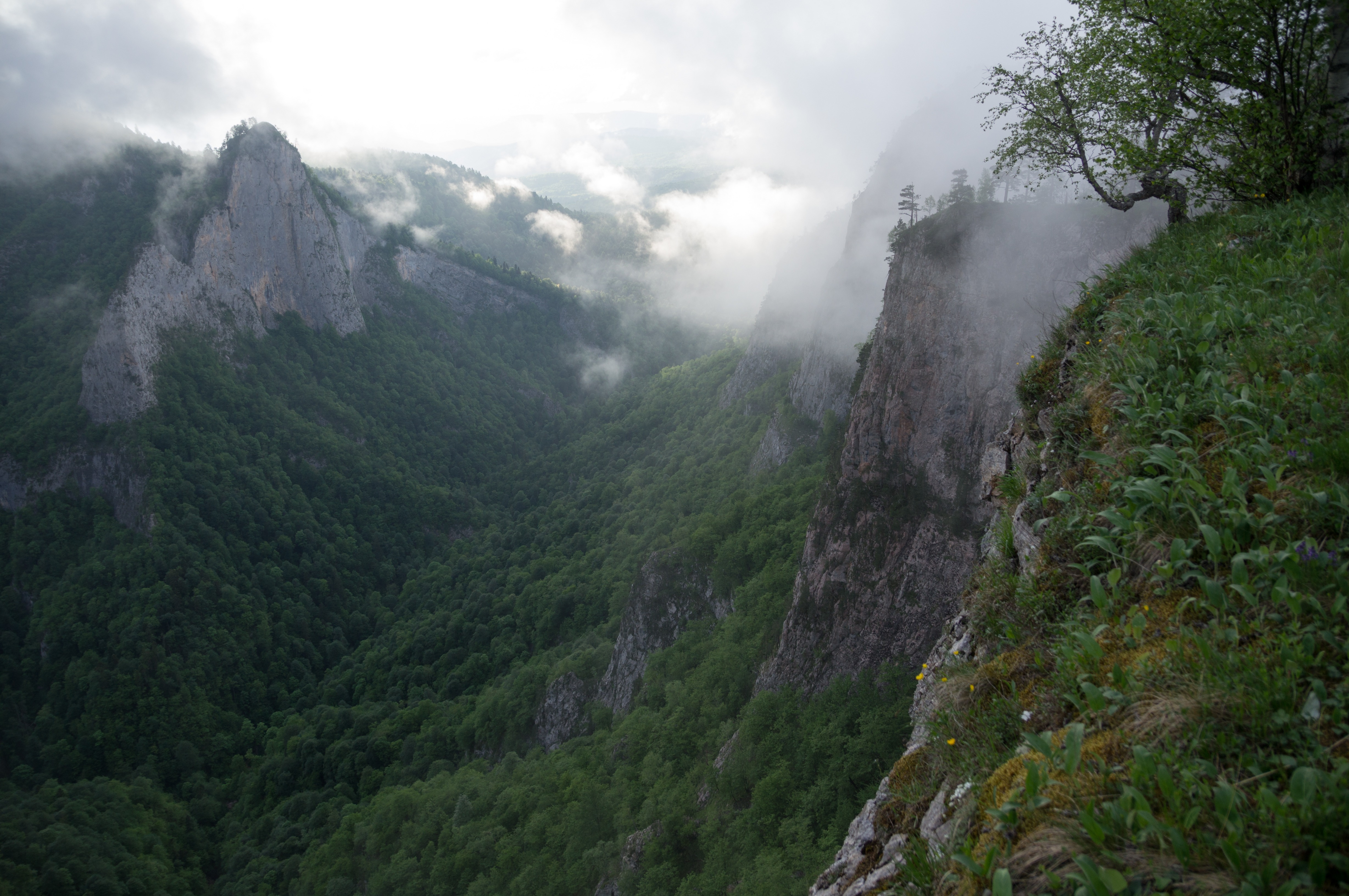 Фотография сделана в драматичных погодных условиях без какого-либо редактирования и обработки. Большой Тхач: Майкопский район, Адыгея. This image is related to the protected area of Russia number 0110014